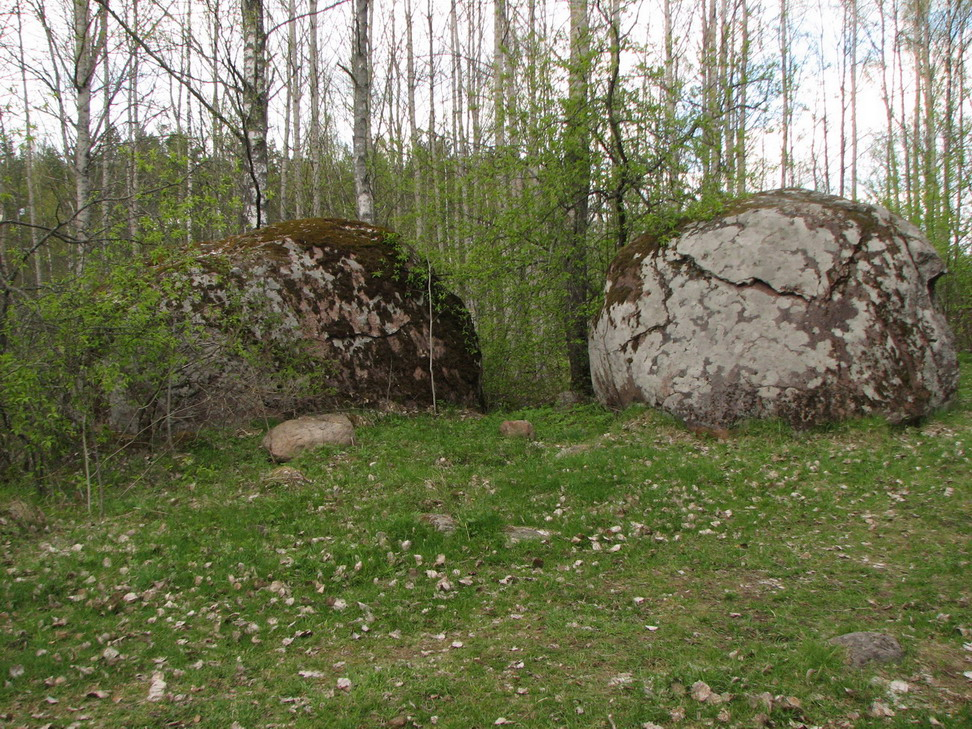 Tiversk